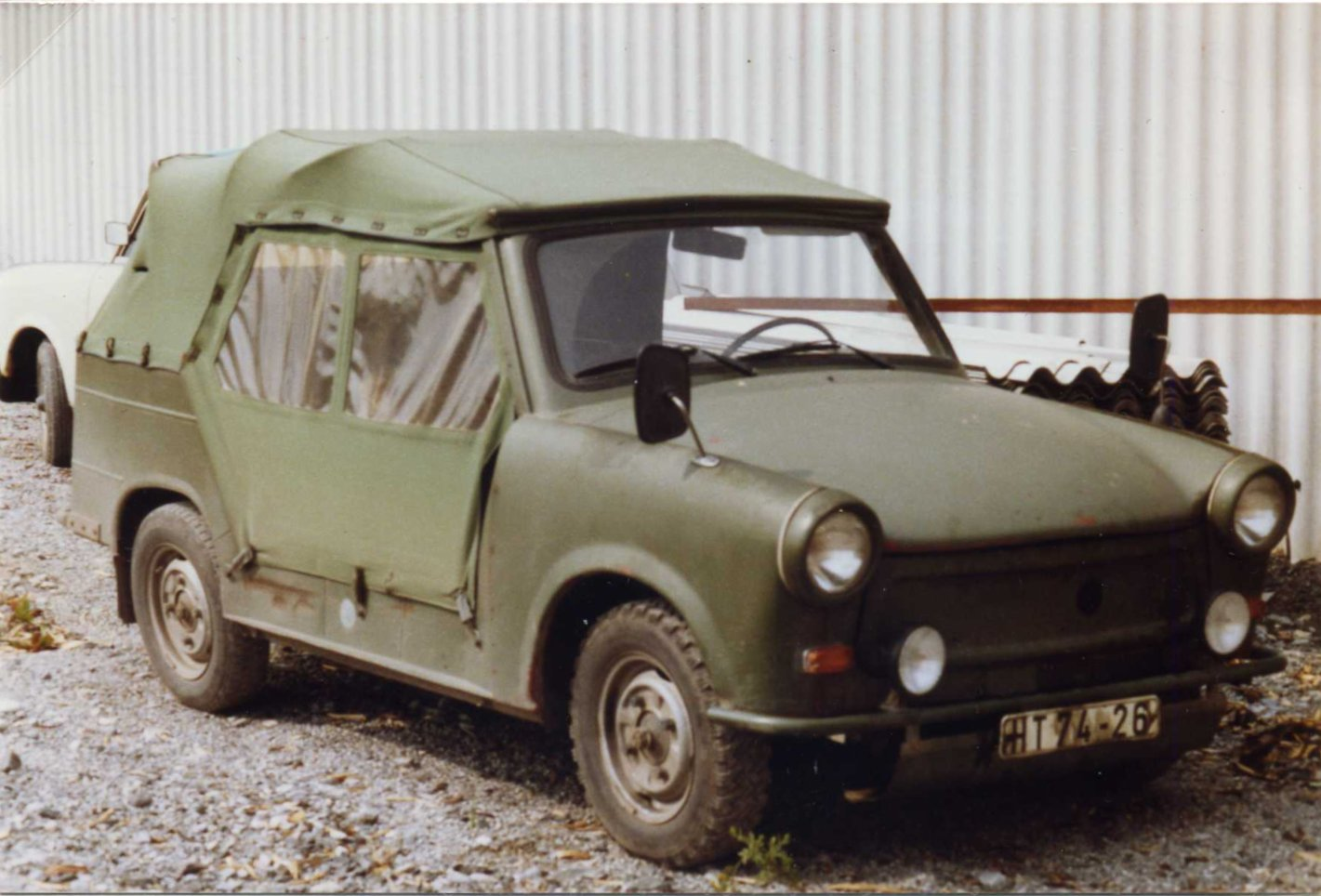 Ex-NVA Trabant Kübelwagen, Stiege (Harz), Germany, August 1989, registered in Bezirk Magdeburg.